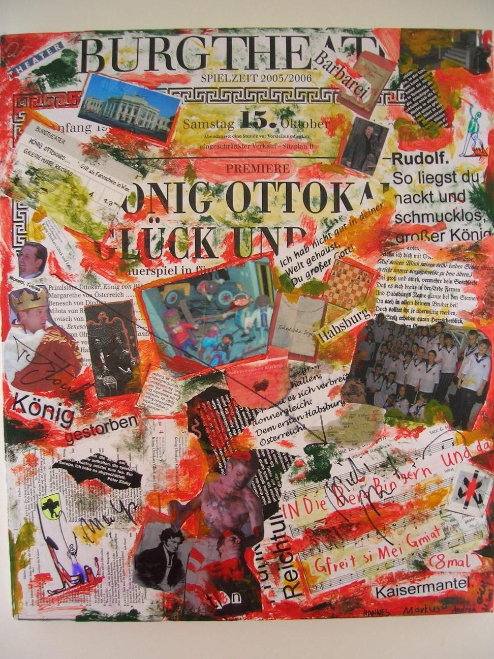 Plakat zur Martin Kusejs Ottokar-Inszenierung (2005 Salzburg)